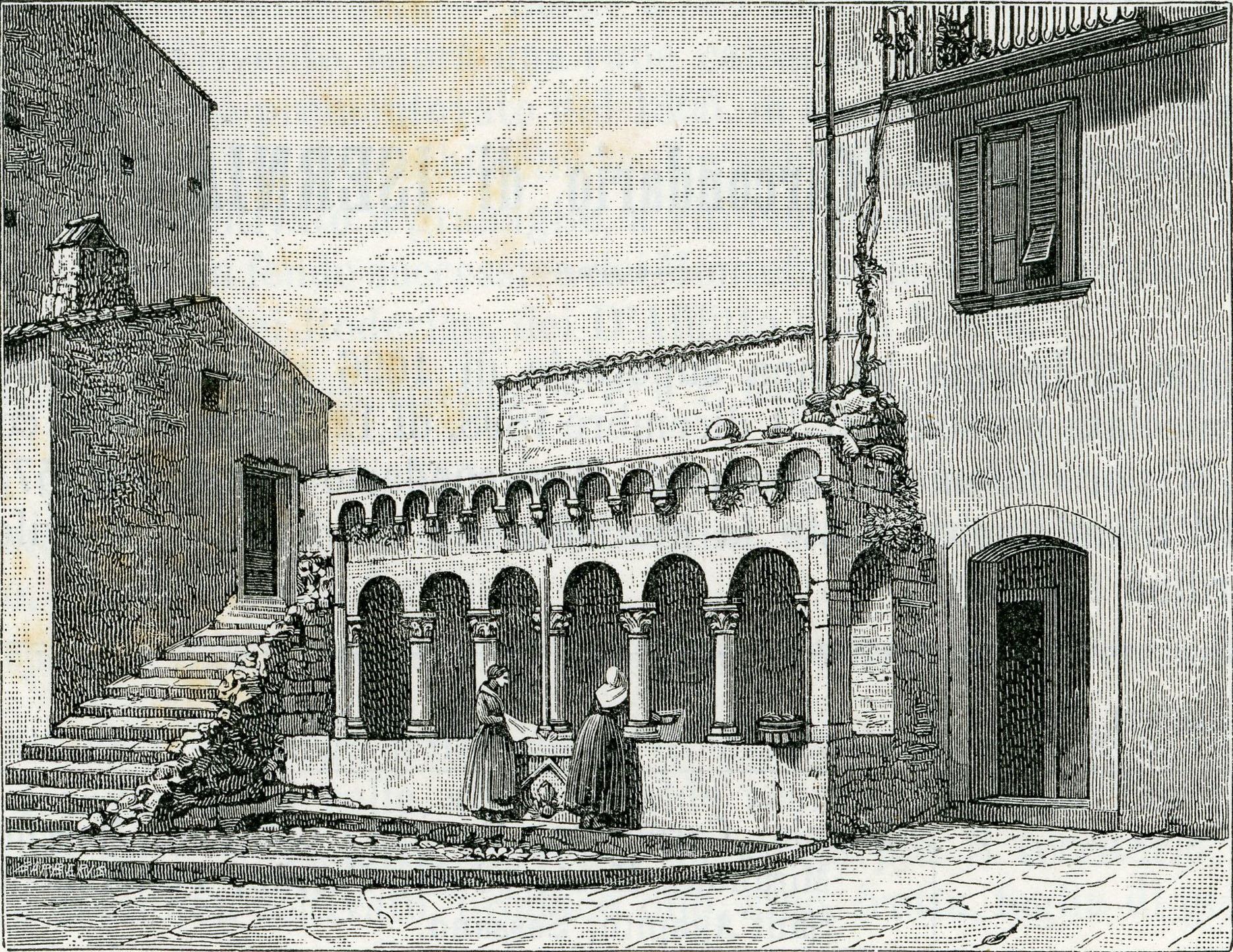 Isernia: fontana fraterna (xilografia di Barberis 1898).